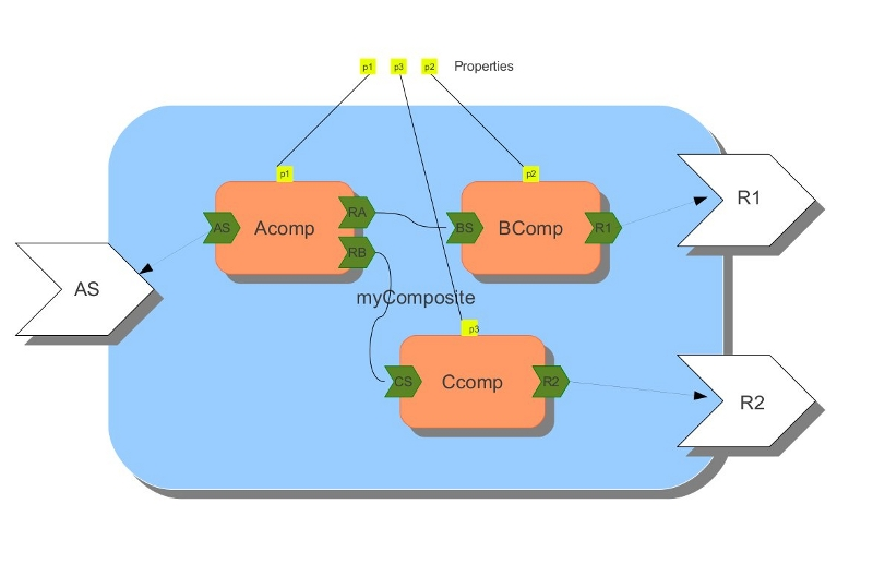 SCA-kompozíció